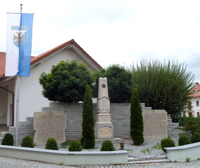 Kriegerdenkmal im Ortsteil Adlkofen